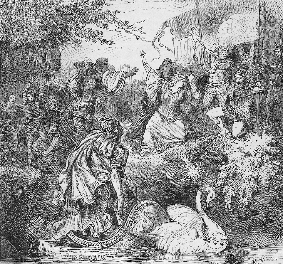 Lohengrins Ankunft in Brabant /aus: Illustrierte Literaturgeschichte, Autor: Otto von Leixner, Leipzig 1880 Sonstiges